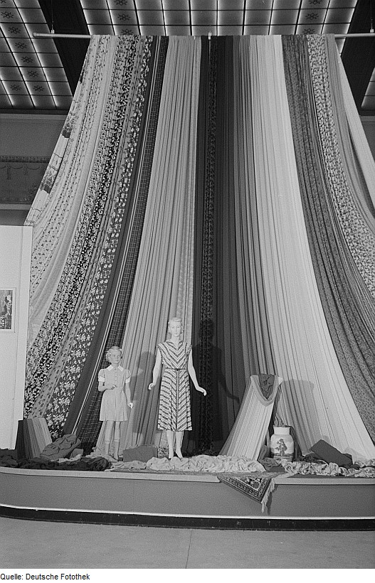 Original image description from the Deutsche Fotothek Ausgestellte Textilien auf der Leipziger Herbstmesse 1954